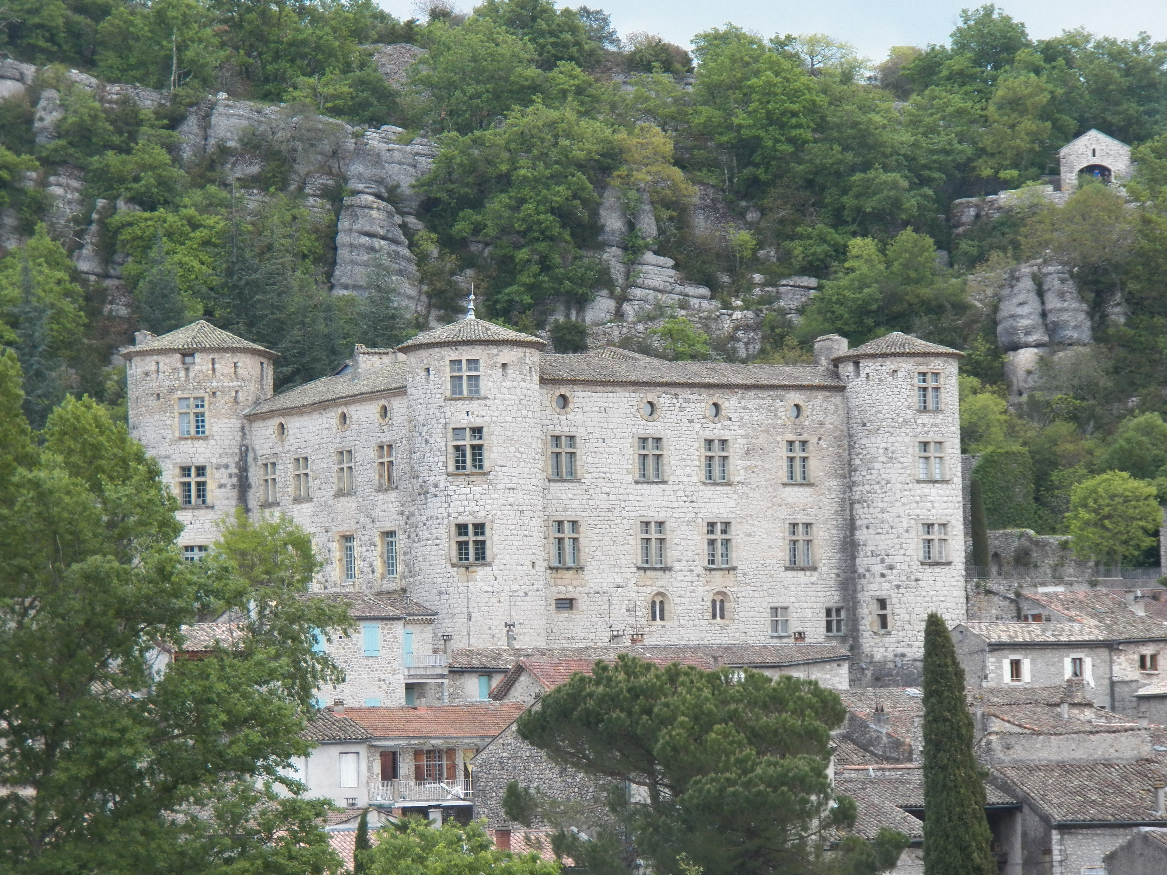 le château